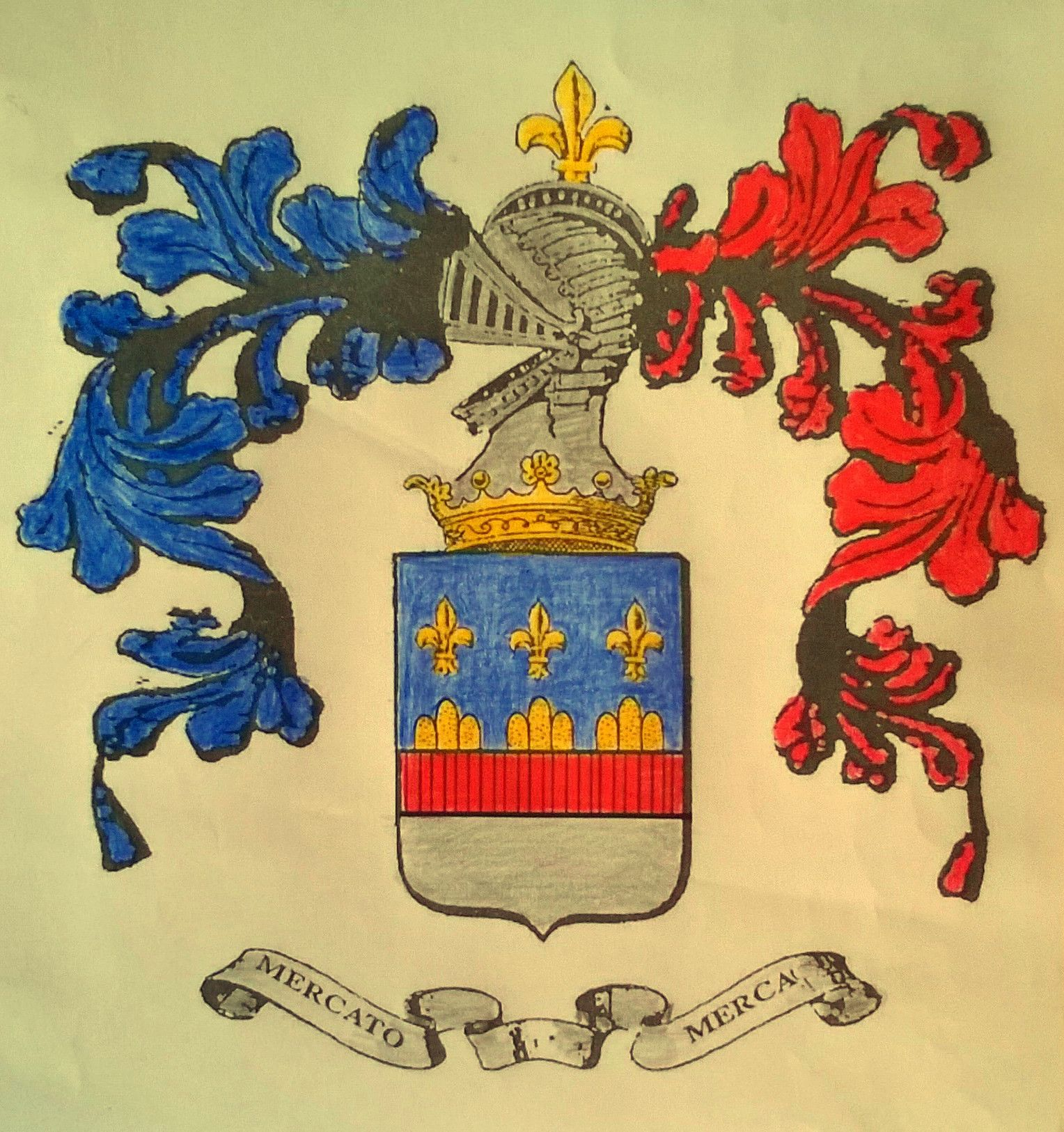 Formato dallo stemma dei Sanseverino Baroni del Cilento e col primo Capo formato da 3 monti indicanti i primi 3 feudi ( Giungano, Convingenti, Mercato del Cilento ) ; aggiunto per concessione sovrana il Capo d' Angiò per la partecipazione all' assedio di Capaccio (1245 ) e alla battaglia di Benevento (1266) col partito sanseverinesco angioino. Il motto -Mercato Merca- aggiunge al cognome la voce antica dal provenzale 'mercar' marchiare, bell esempio di motto che deve essere allusivo, enigmatico e elogiativo